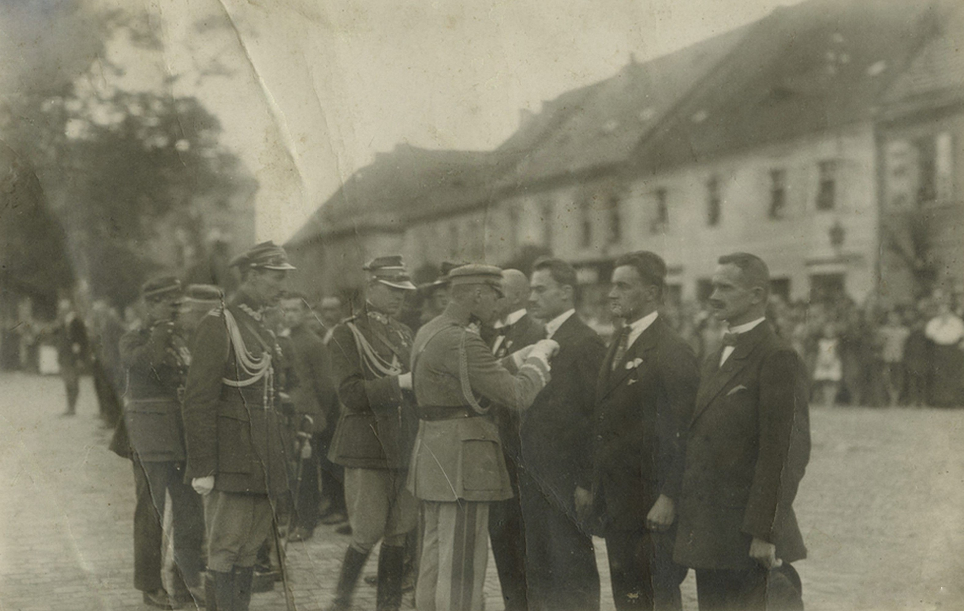 Pszczyna, Rynek, 28 sierpnia 1922. Marszałek Polski Józef Piłsudski przypina ppor. Stanisławowi Krzyżowskiemu Krzyż Srebrny Orderu Virtuti Militari